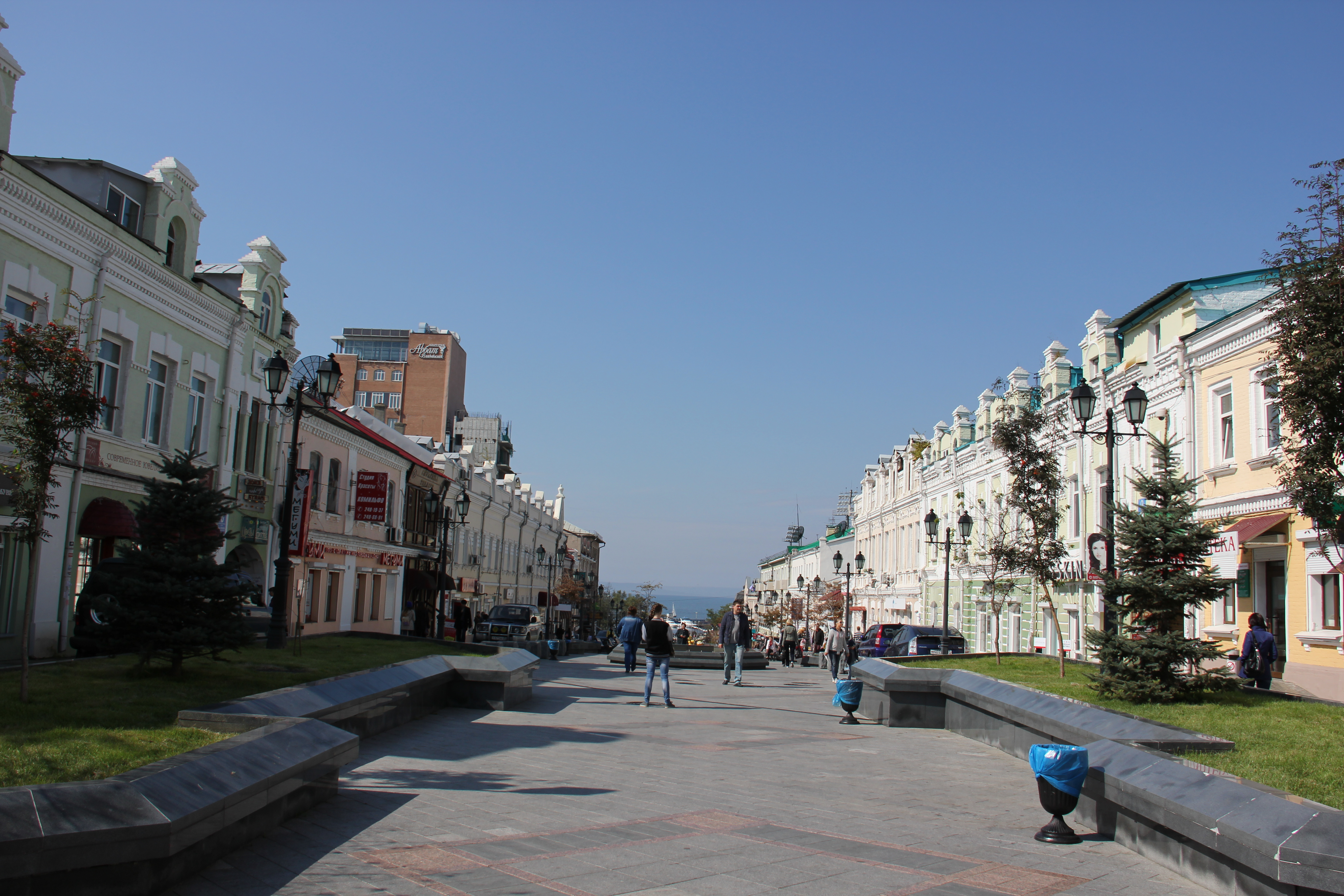 Архитектурный ансамбль застройки участка улицы Адмирала Фокина от Океанского проспекта до Пограничной улицы (Приморский край, Владивосток, Адмирала Фокина улица)